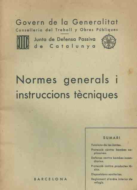 Publicació de l'any 1936 de la Generalitat de Catalunya amb les Normes generals i instruccions tècniques a emprar a dins dels refugis antiaeris durant els bombardejos a ciutats catalanes durant la Guerra Civil.